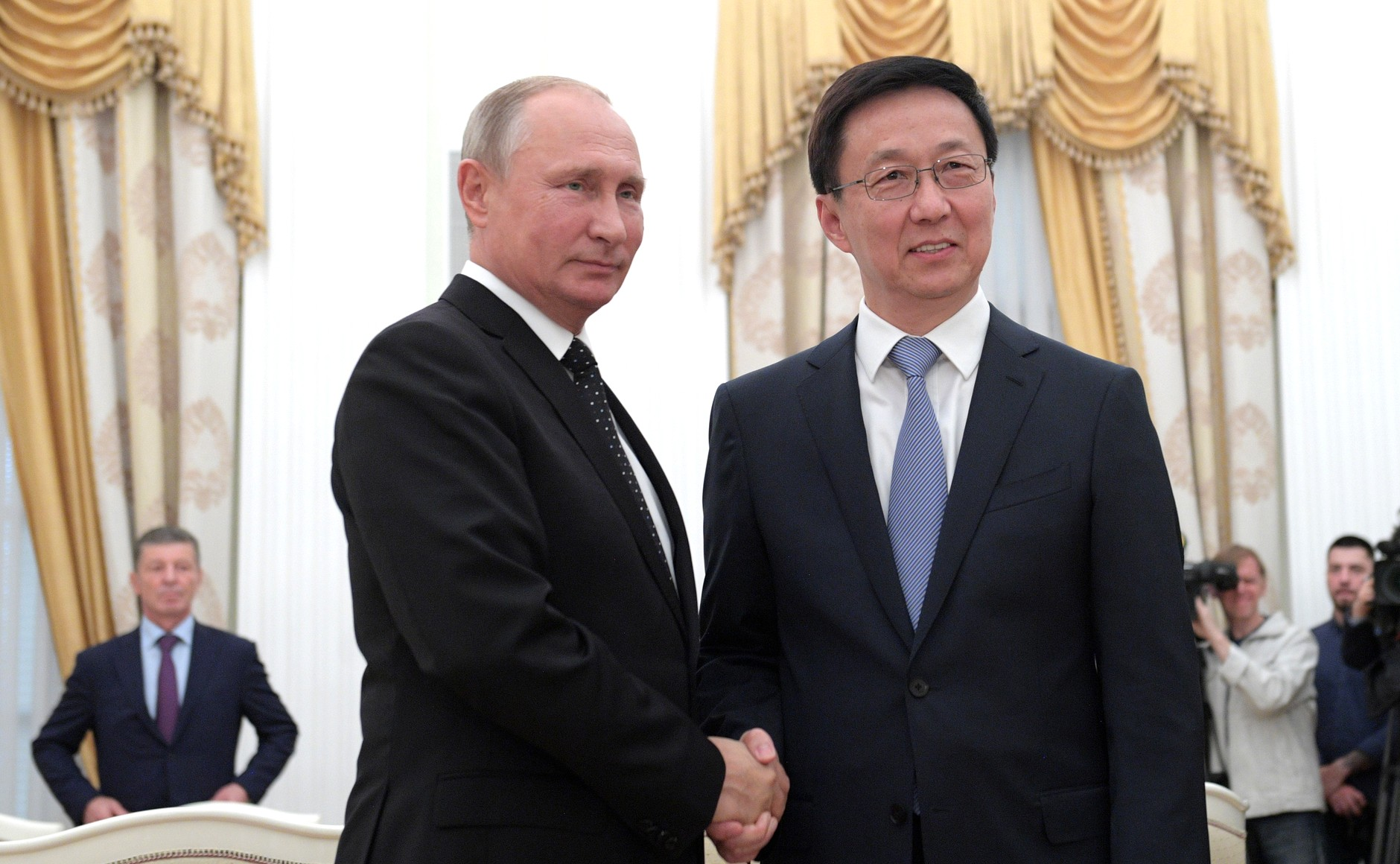 Встреча Президента Российской Федерации Владимира Путина с Первым заместителем Премьера Государственного совета Китайской Народной Республики Хань Чжэном